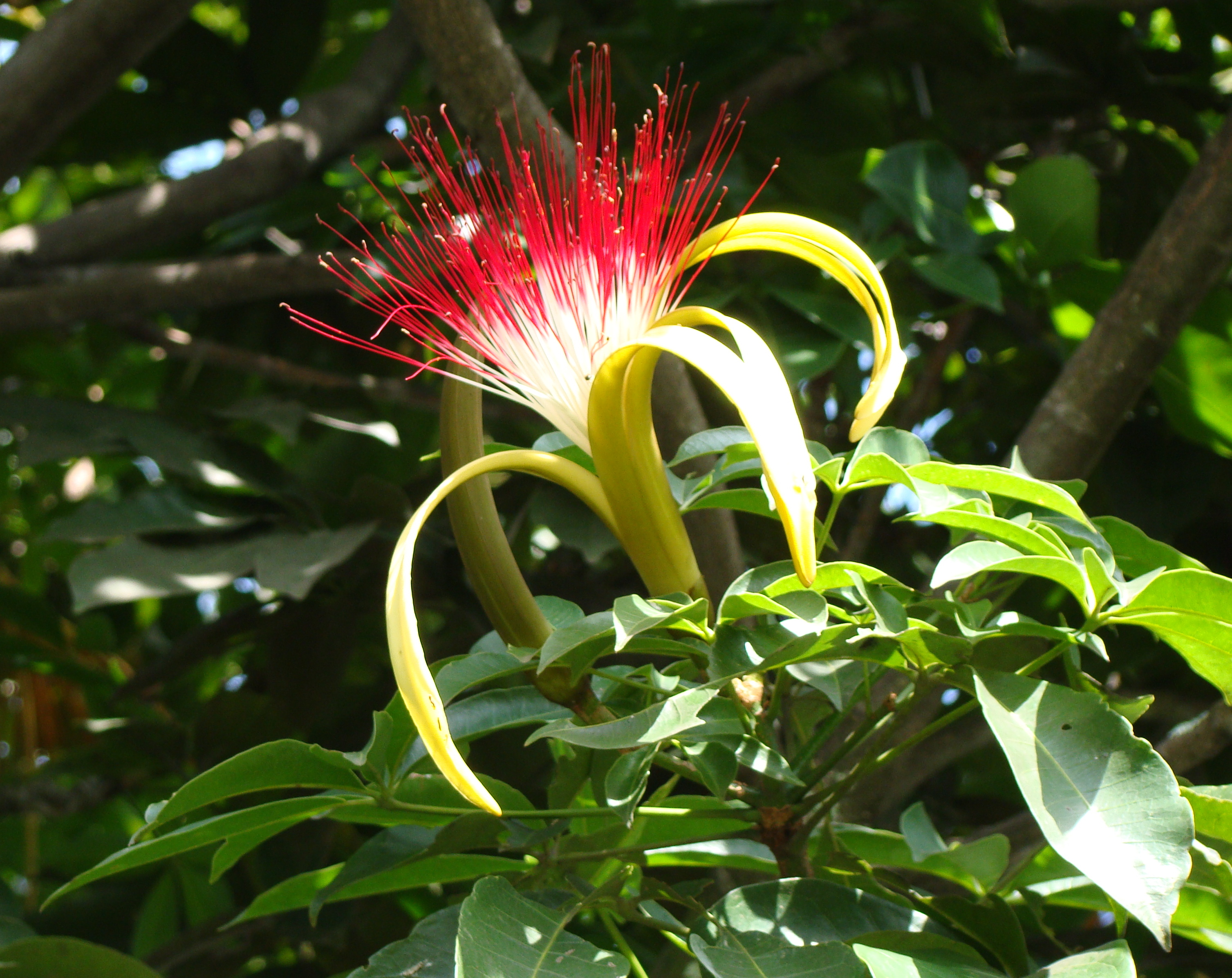 Park Ceret São Paulo